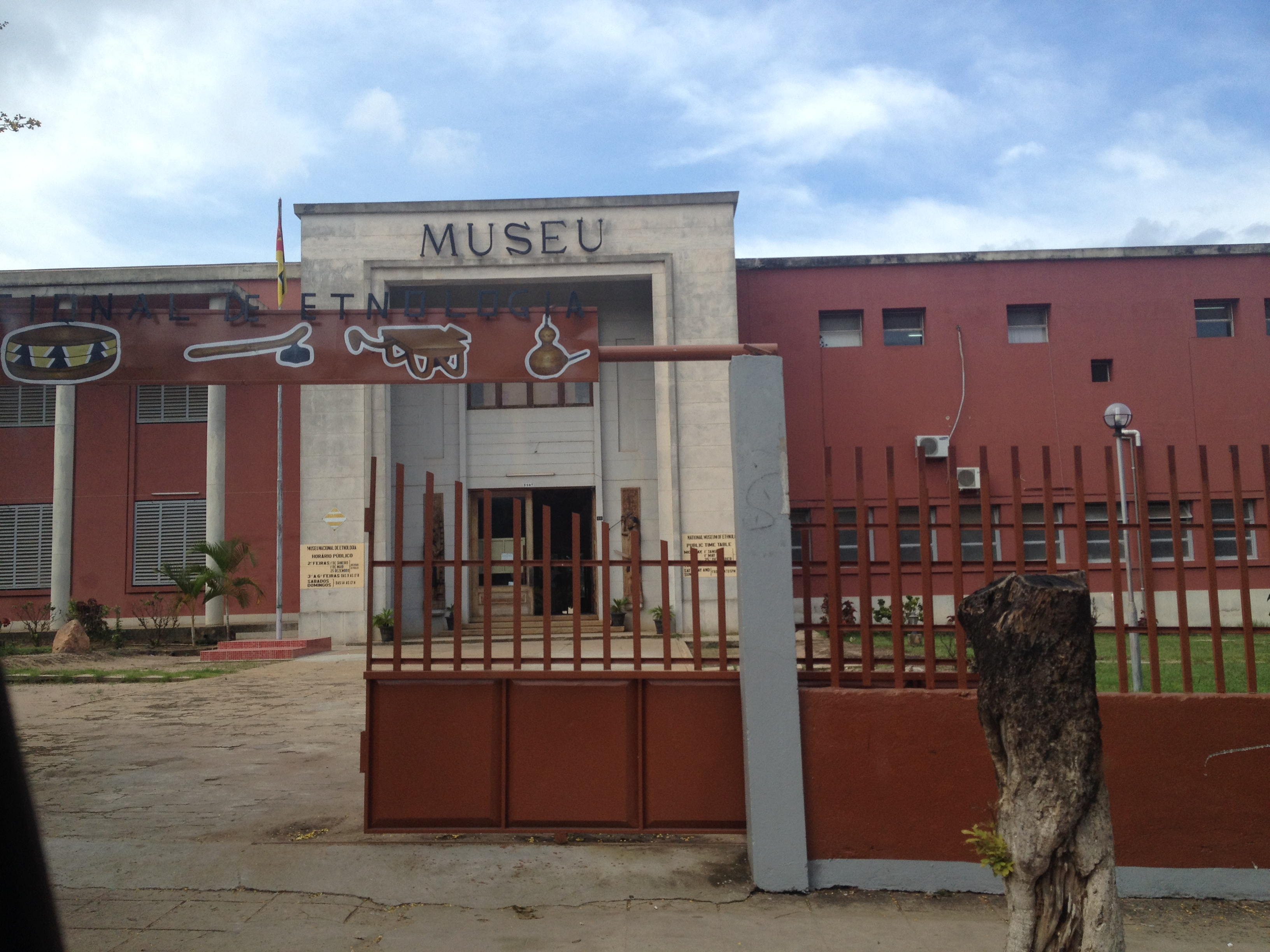 El Museo nacional de etnografía de Nampula es el único museo nacional de Mozambique que no está localizado en Maputo.